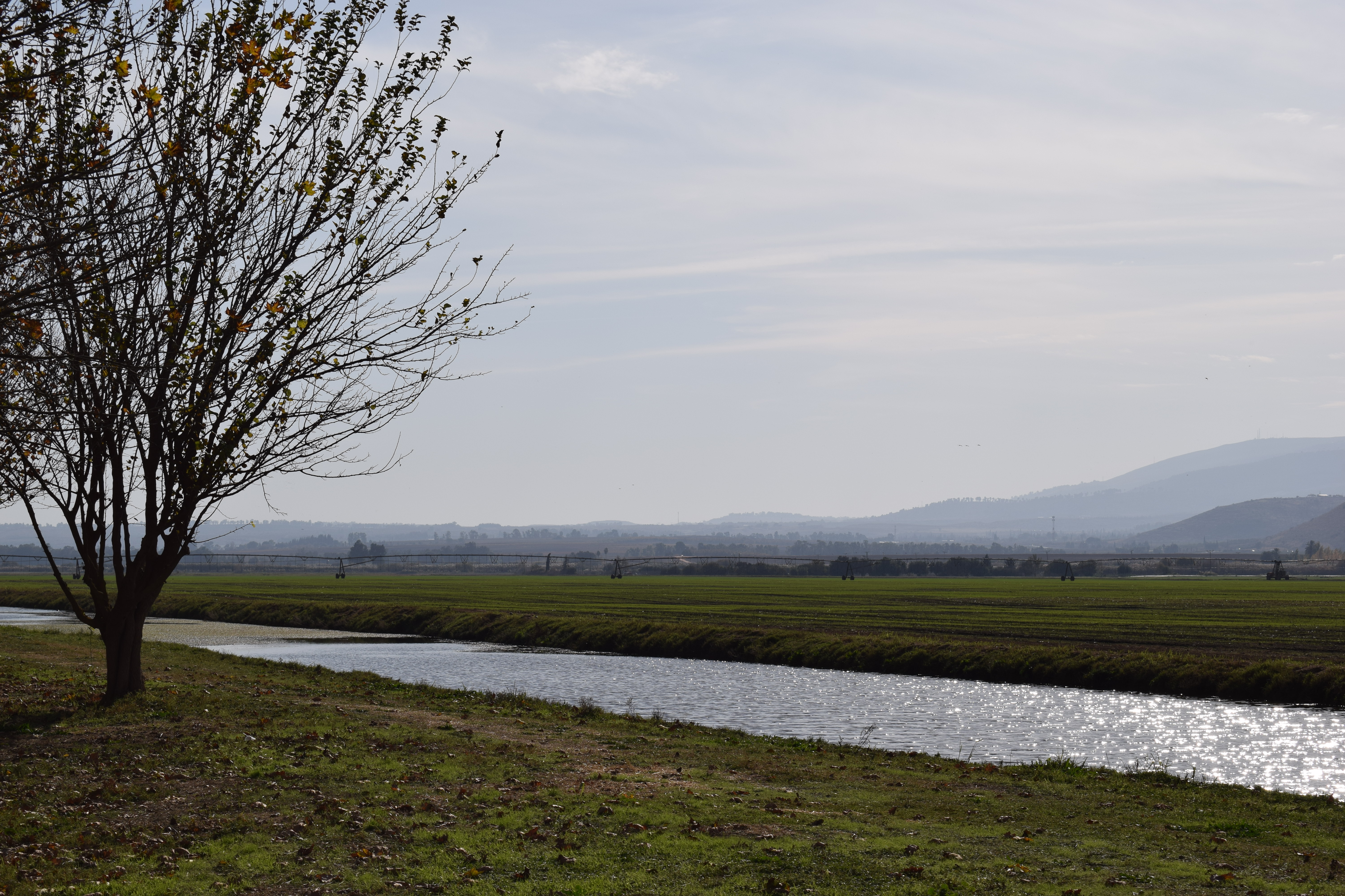 אגמון החולה נוף